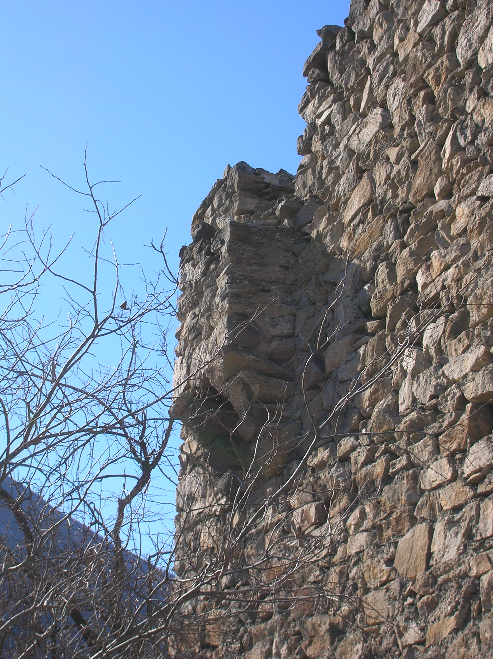 Dettaglio della Torre dei Salassi. Jovençan, Valle d'Aosta, Italia.